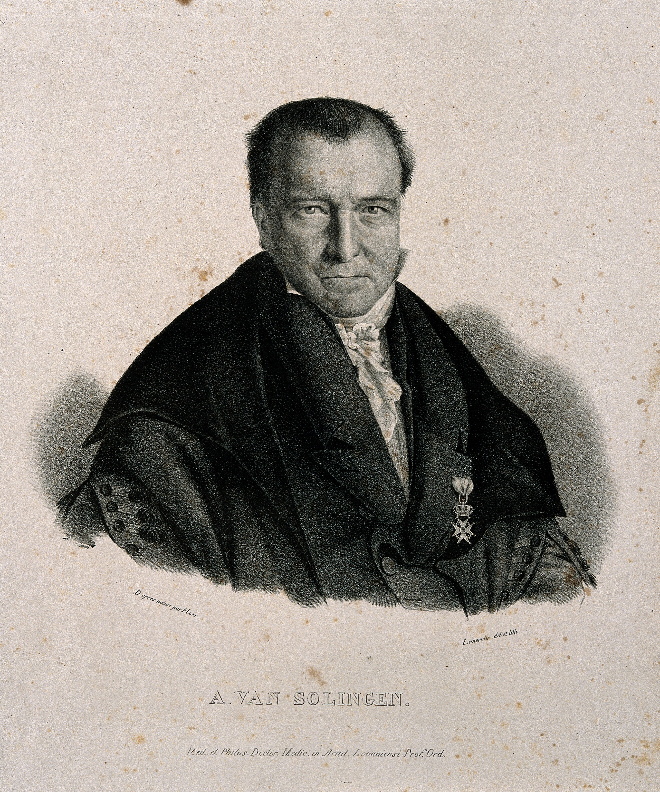 Genre/Technique: Portrait prints. Lithographs.